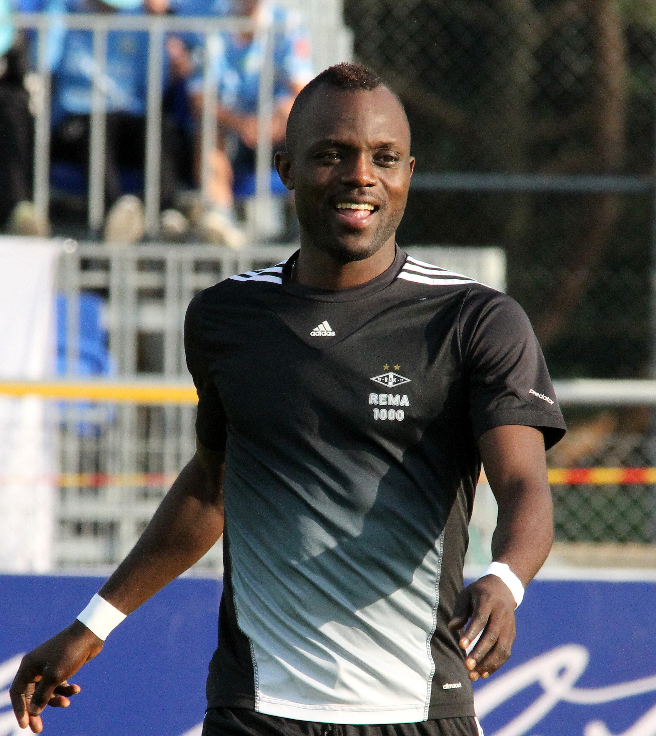 John Chibuike på Sandnes stadion 25. august 2013